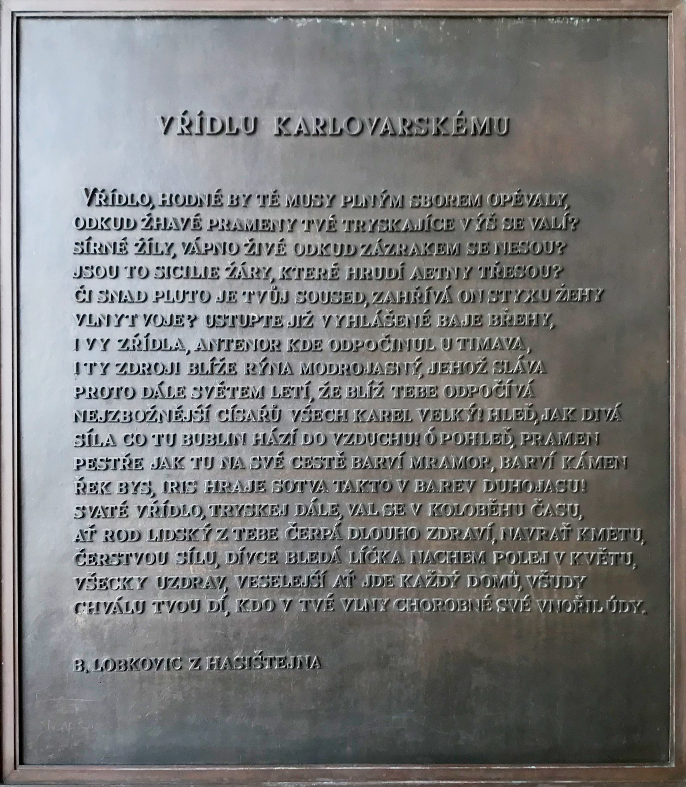 Deska s českým překladem básně "Vřídlu karlovarskému" u Mlýnského pramene v Karlových Varech